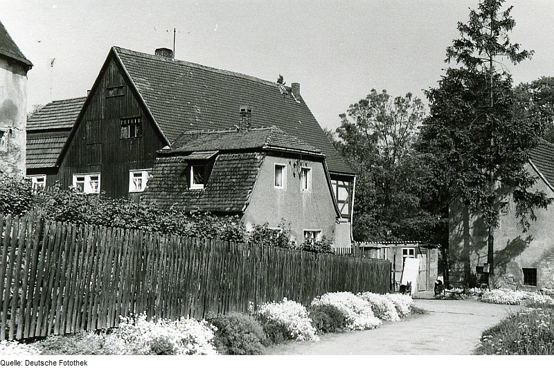 Original image description from the Deutsche FotothekKlipphausen-Sachsdorf. Dorfmühle (Nr. 20)